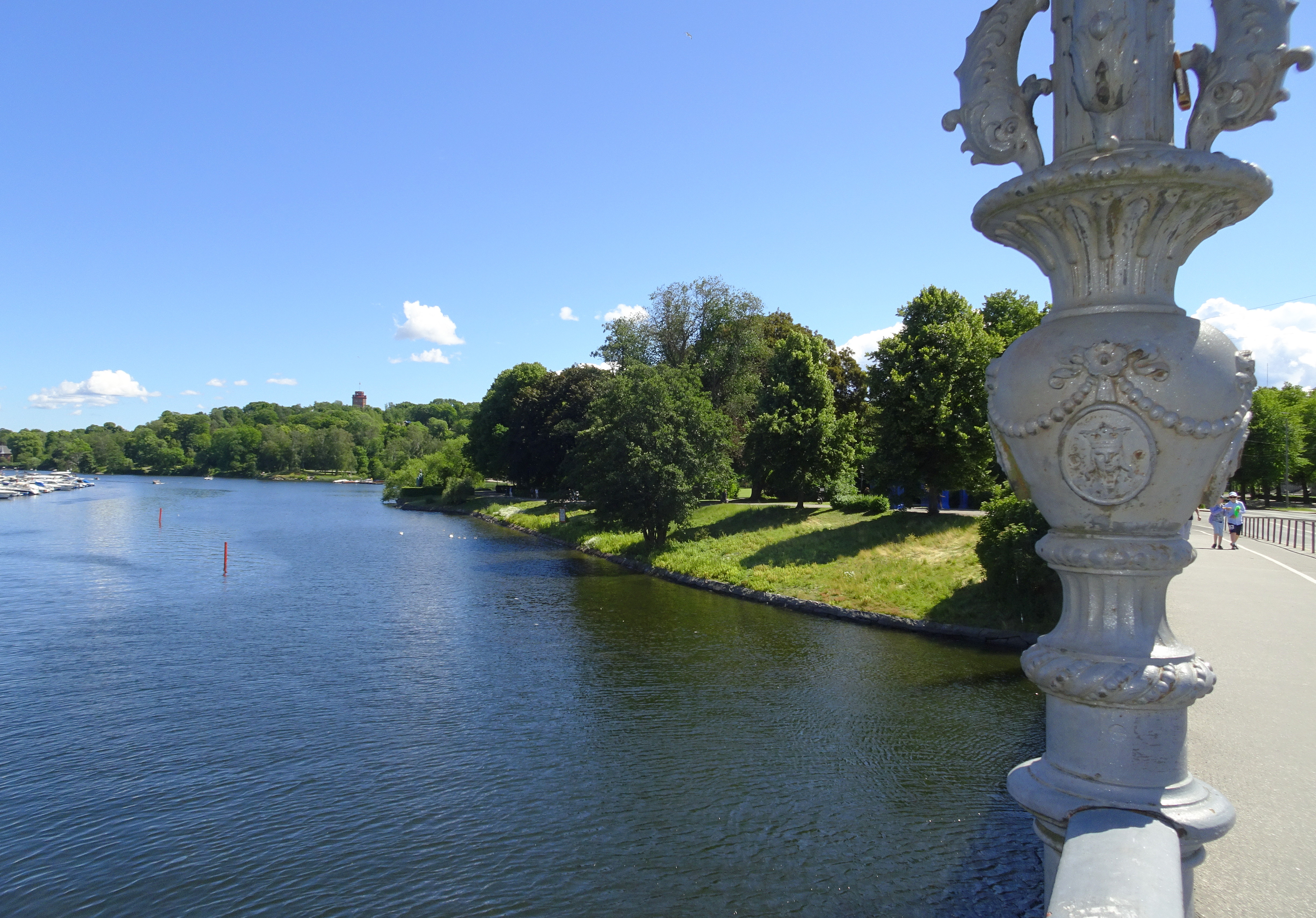 Kaptensudden sedd från Djurgårdsbron